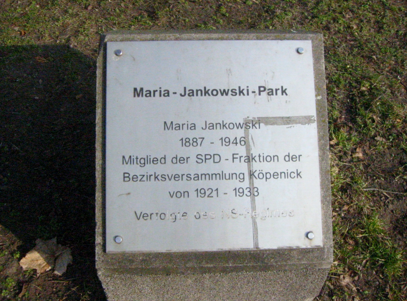 Hinweisschild auf Jankowski am Eingang des Parks in Berlin-Köpenick